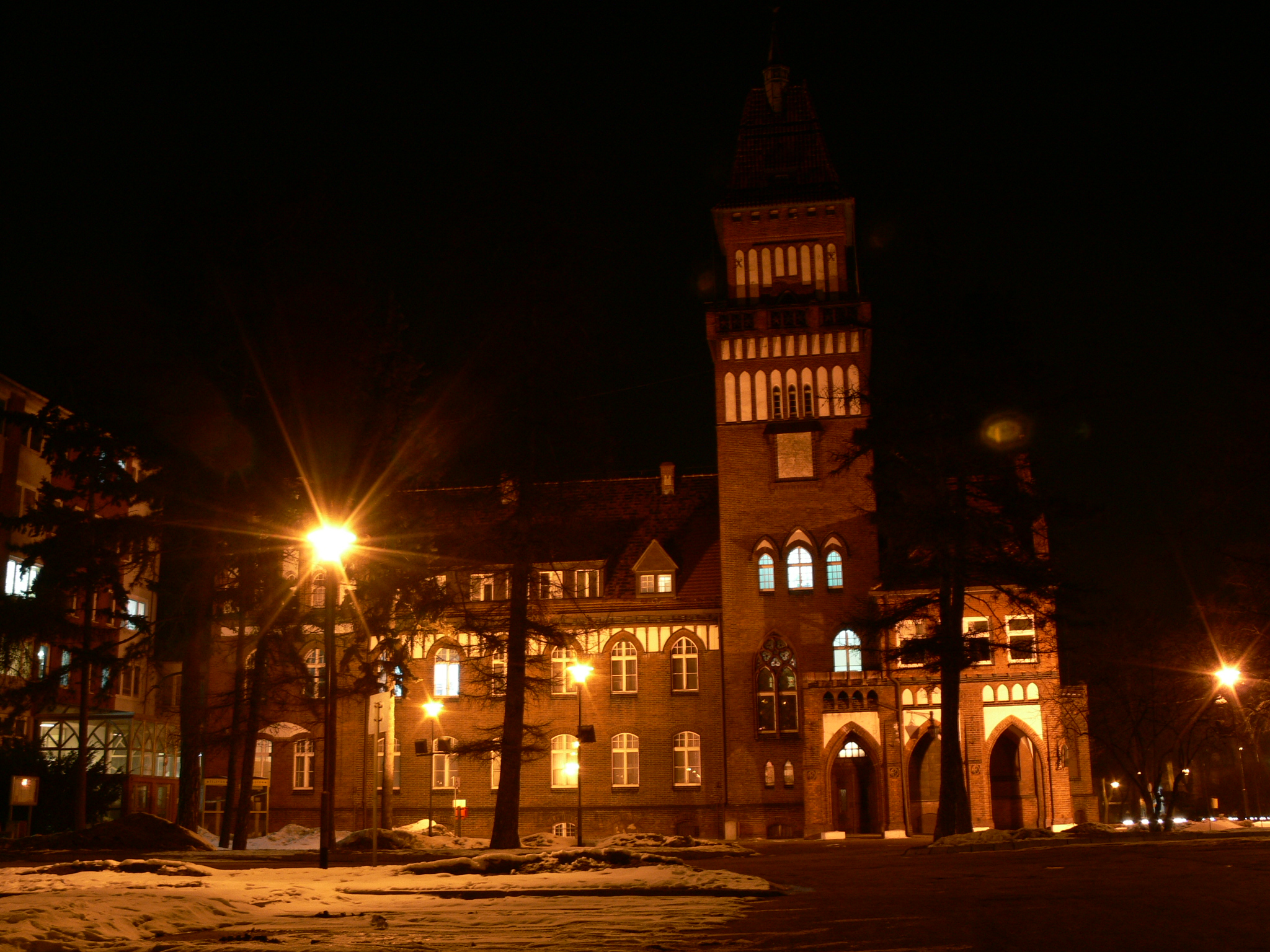 Inowrocaw, ul. Roosevelta 36/38 - dawne starostwo, obecnie Urząd Miasta, 1907-1908